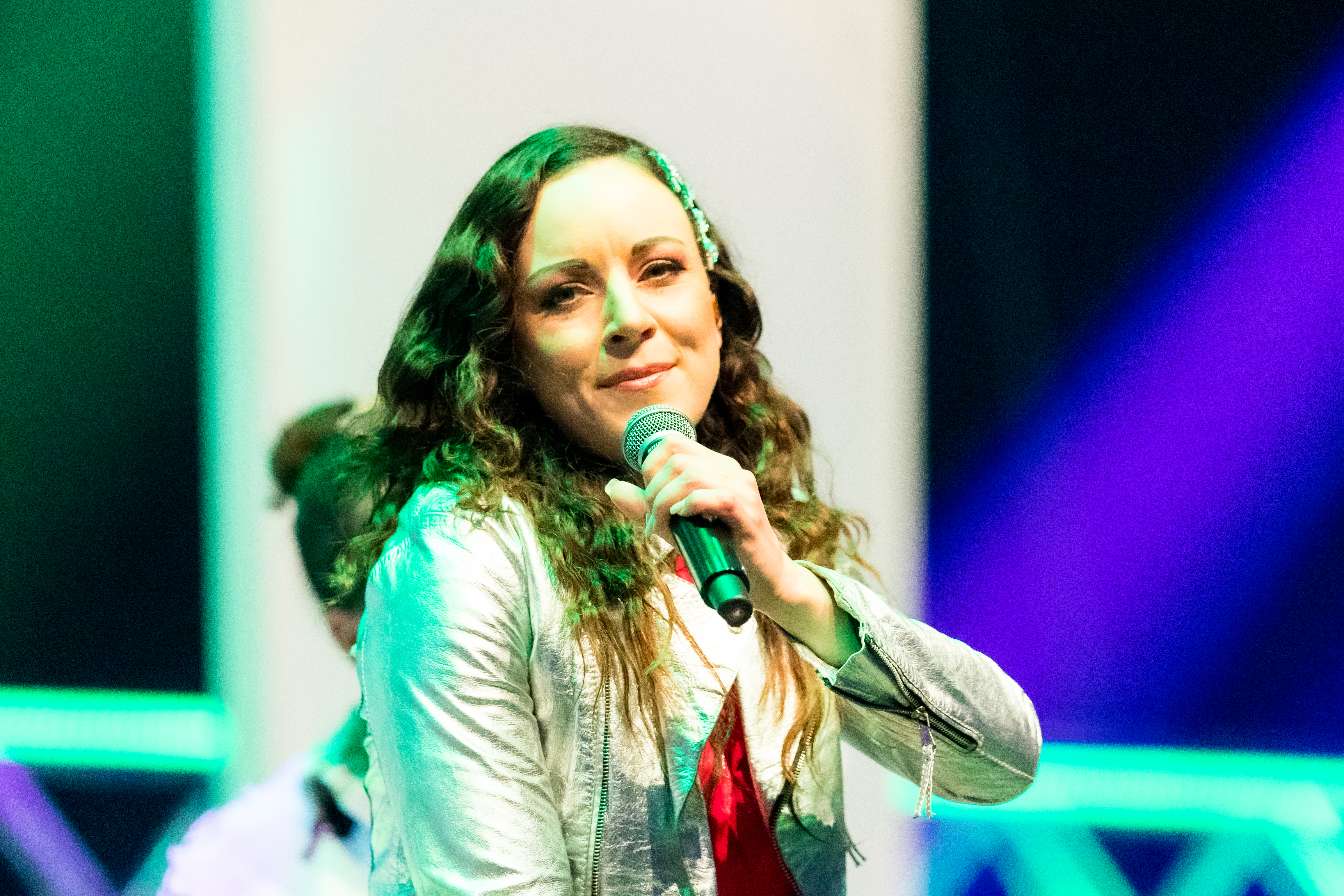 Blümchen during Sunshine Live - Die 90er Live on Stage at Maimarkthalle & Maimarktclub, Mannheim, Baden-Württemberg, Germany on 2019-12-01, Photo: Sven Mandel